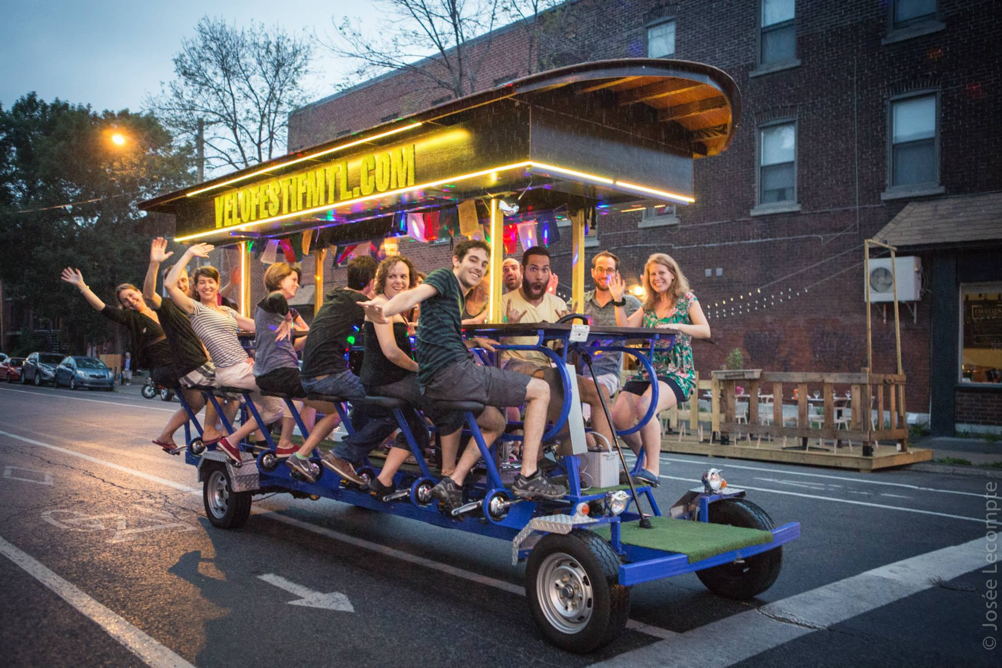 Un groupe de personnes qui font la fête sur un vélo géant dans les rues de Montréal (Vélo Festif MTL)